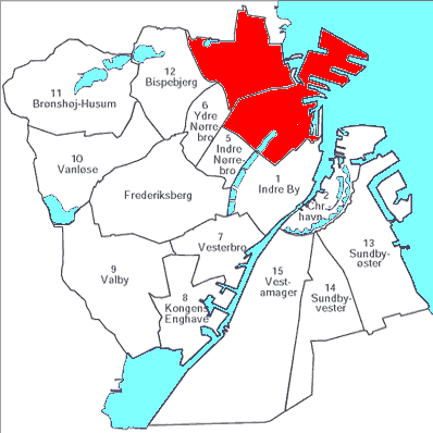 Østerbro, Kopenhagen